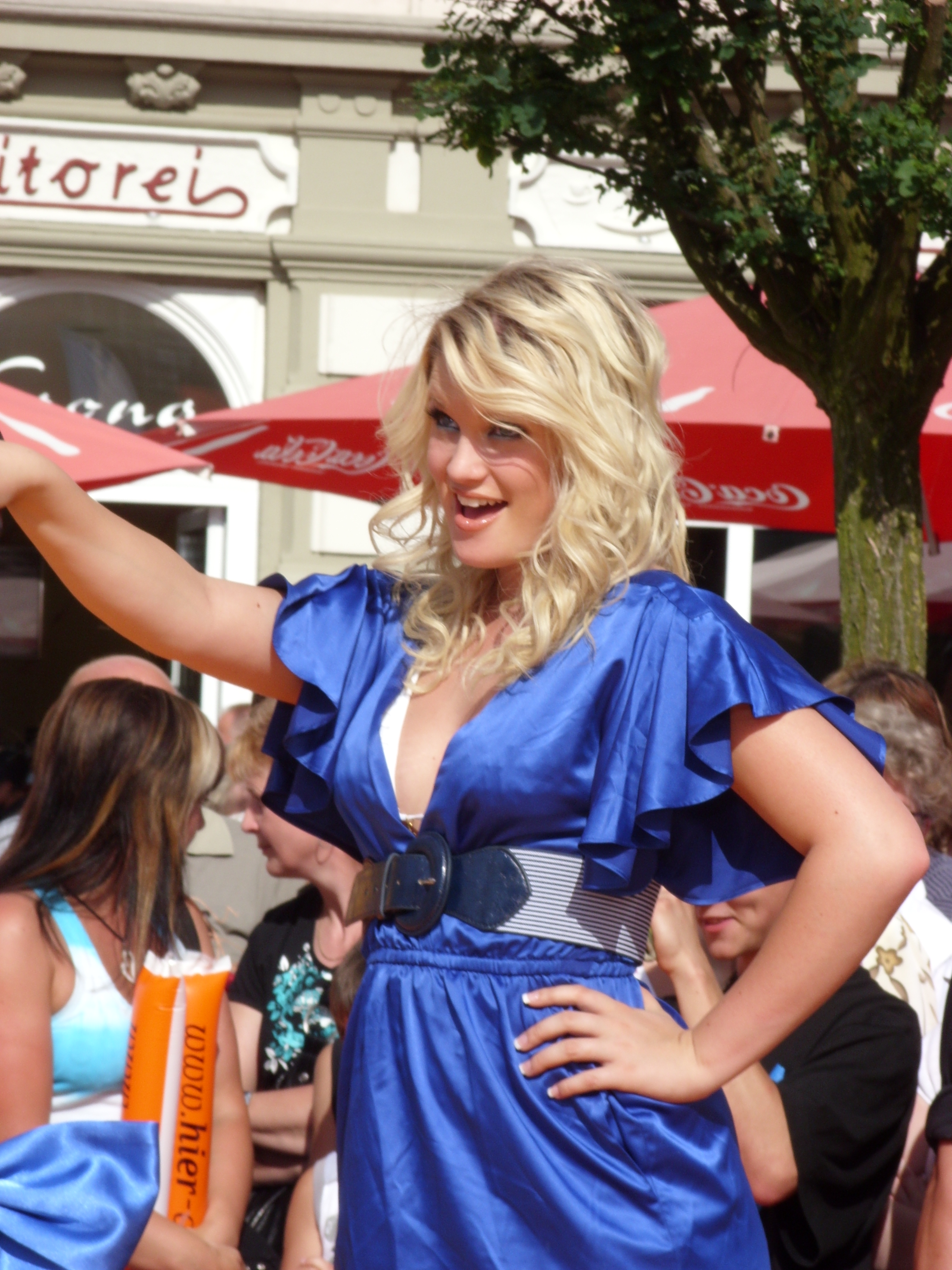 Victoria von Queensberry